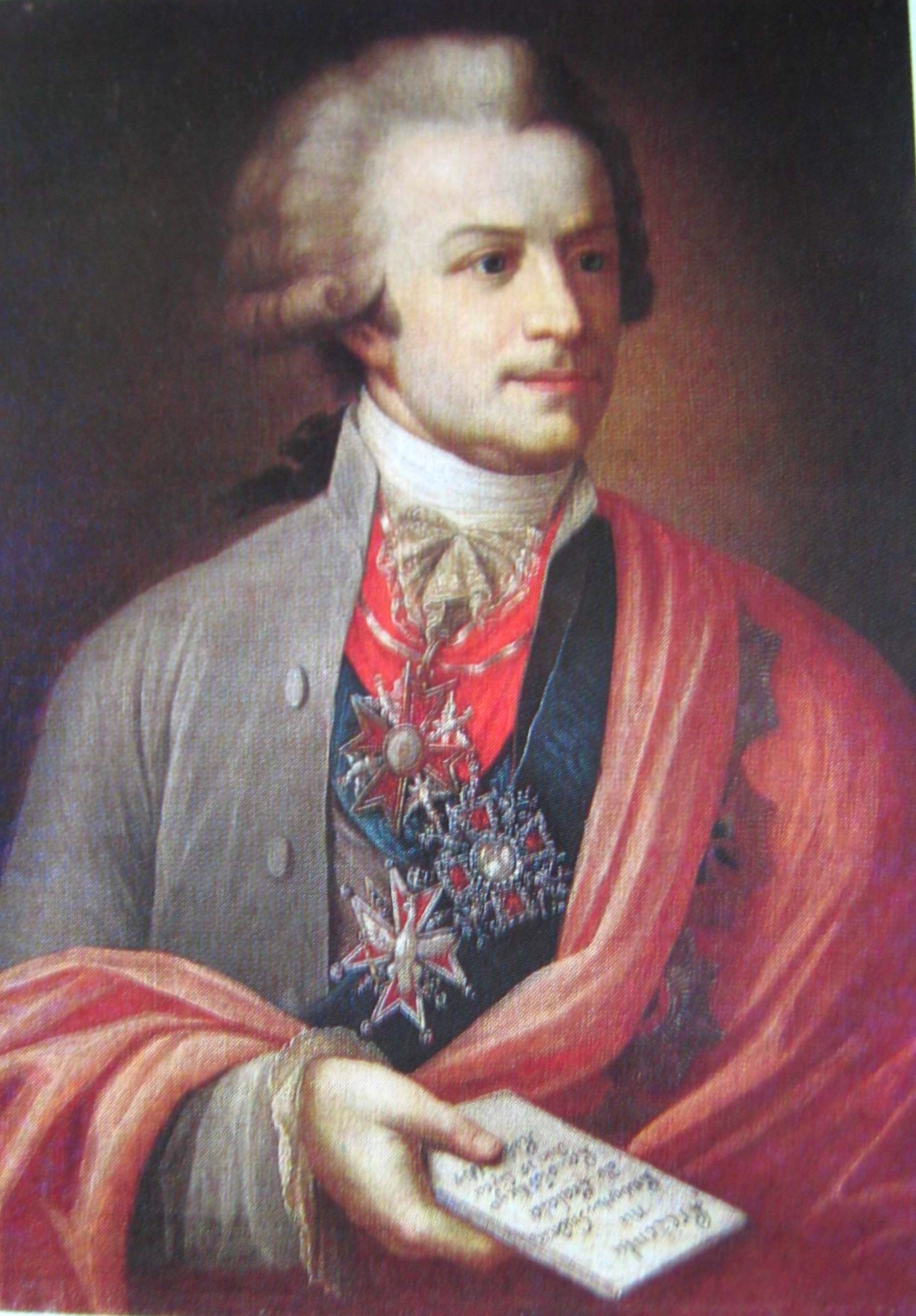 Portrait of Michał Jerzy Wandalin Mniszech (1742–1806)